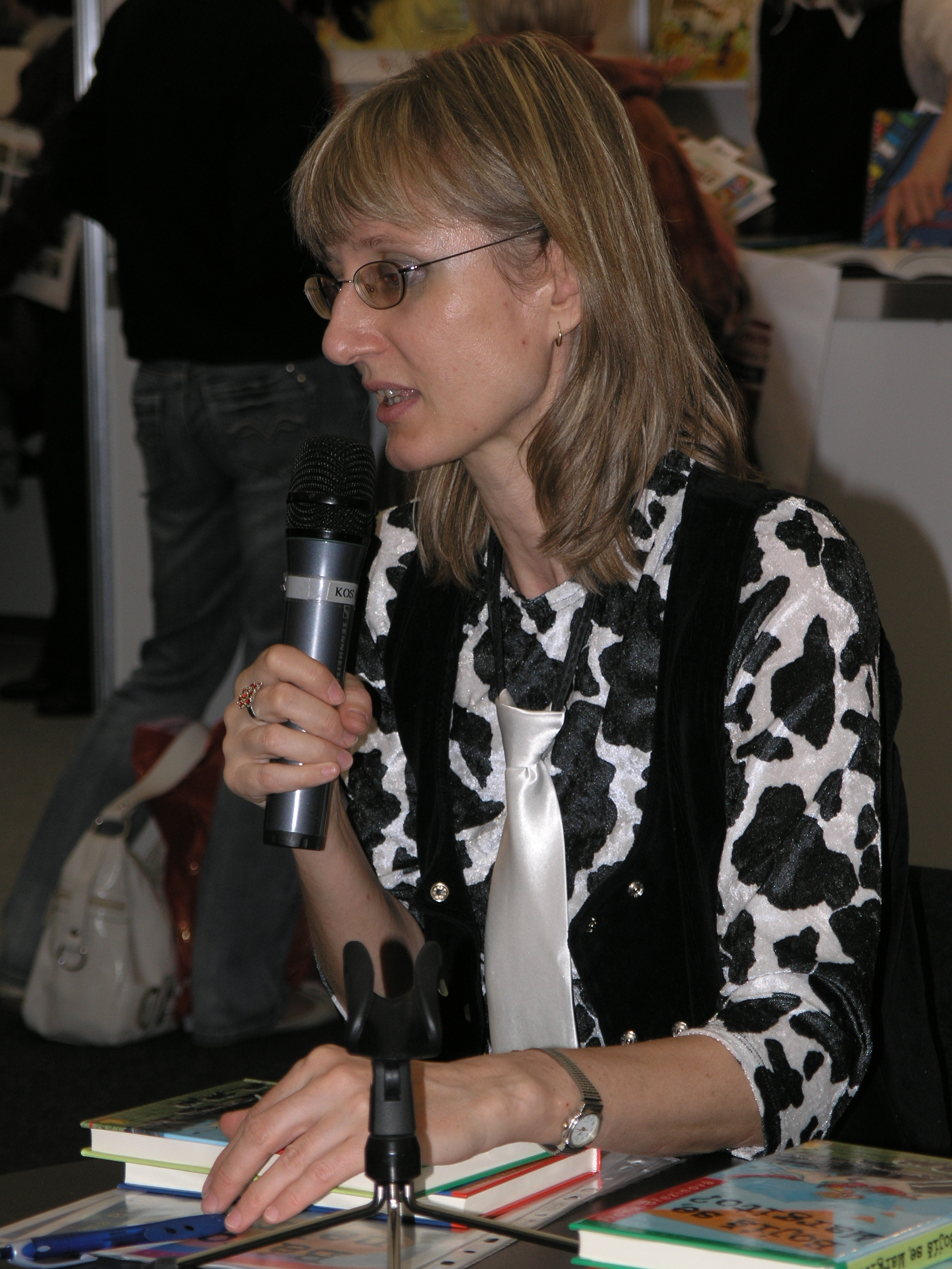 Praha, Svět knihy 2009 - Ivona Březinová